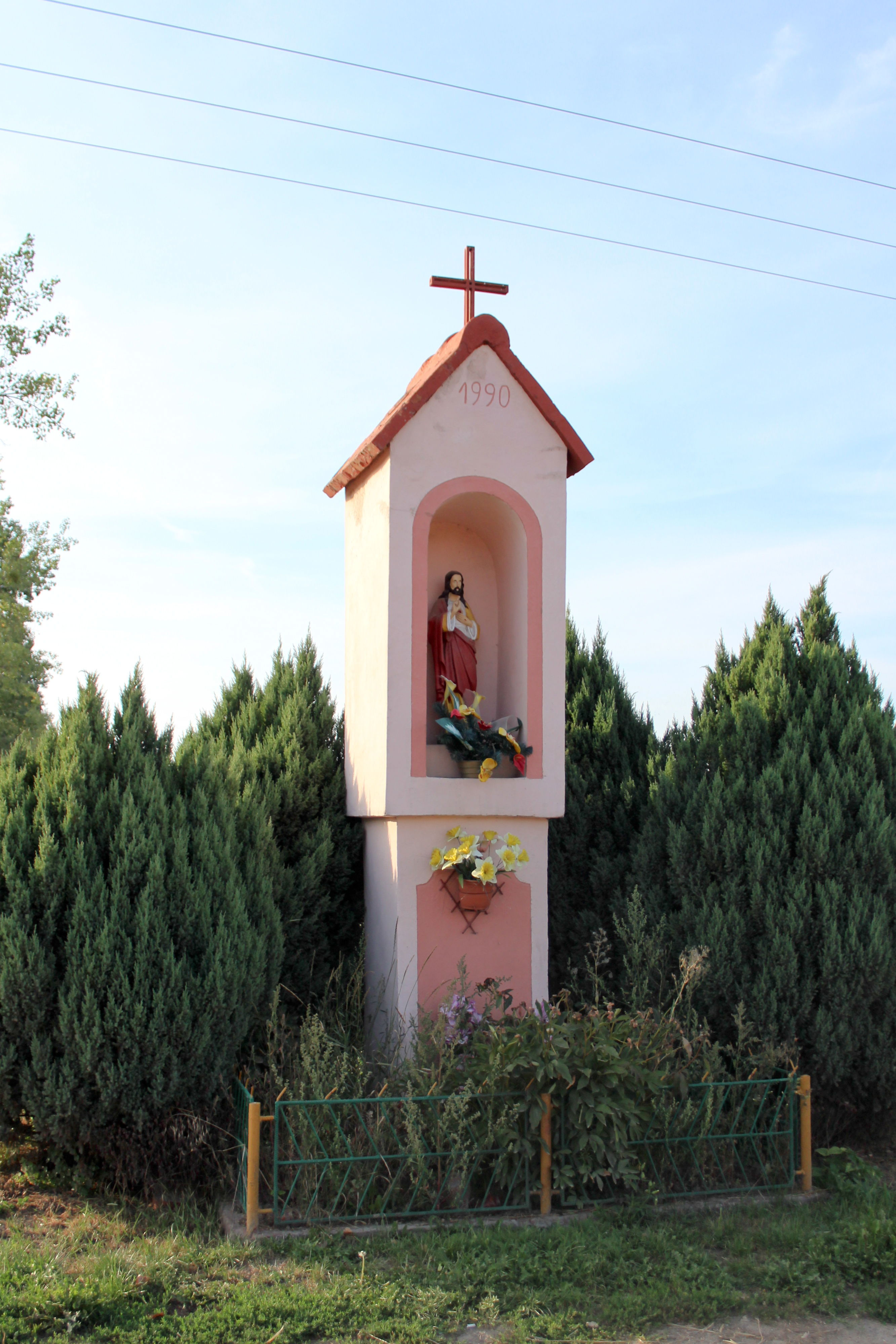 Gola Grodkowska - wieś w Polsce w województwie opolskim, w powiecie brzeskim w gminie Grodków.